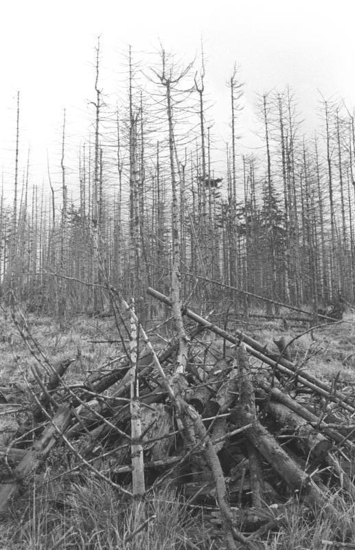 Waldschäden südlich des Fichtelgebirges ADN-ZB/Hirndorf/6.12.89 Bez. Karl-Marx-Stadt: Umwelt Waldsterben? Dieser Wald ist längst erledig. Beobachtet südlich des Fichtelgebirges. Information added by Wikimedia users.